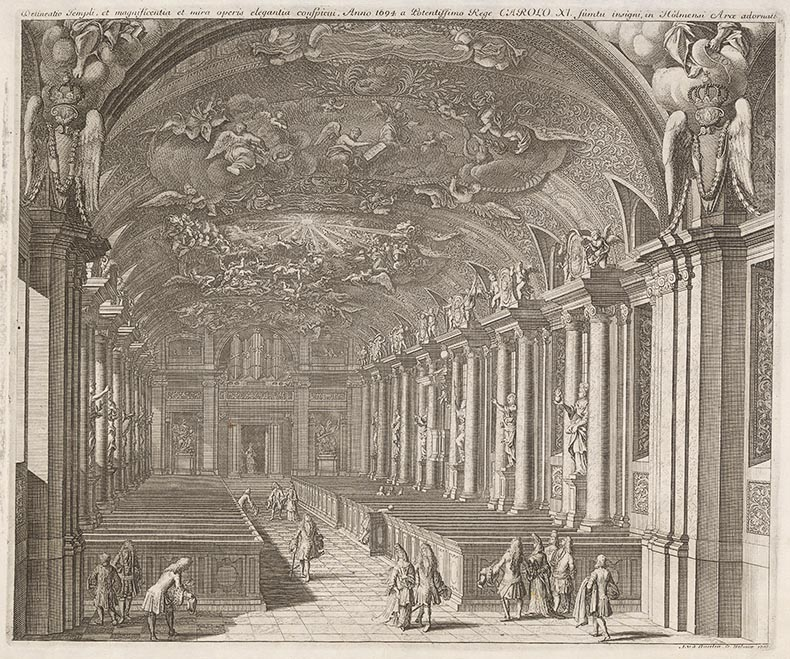 Titel Delineatio Templi et magnificentia et mira operis elegantia conspicui, Anno 1694 a Potentissimo Rege Carolo XI, sumtu insigni, in Holmensi Arce adornati Titel i översättning Avbildning av den praktfulla och vackert utsmyckade kyrkan i Stockholms slott, inredd med mycken bekostnad år 1694 av den stormäktige konungen Karl XI